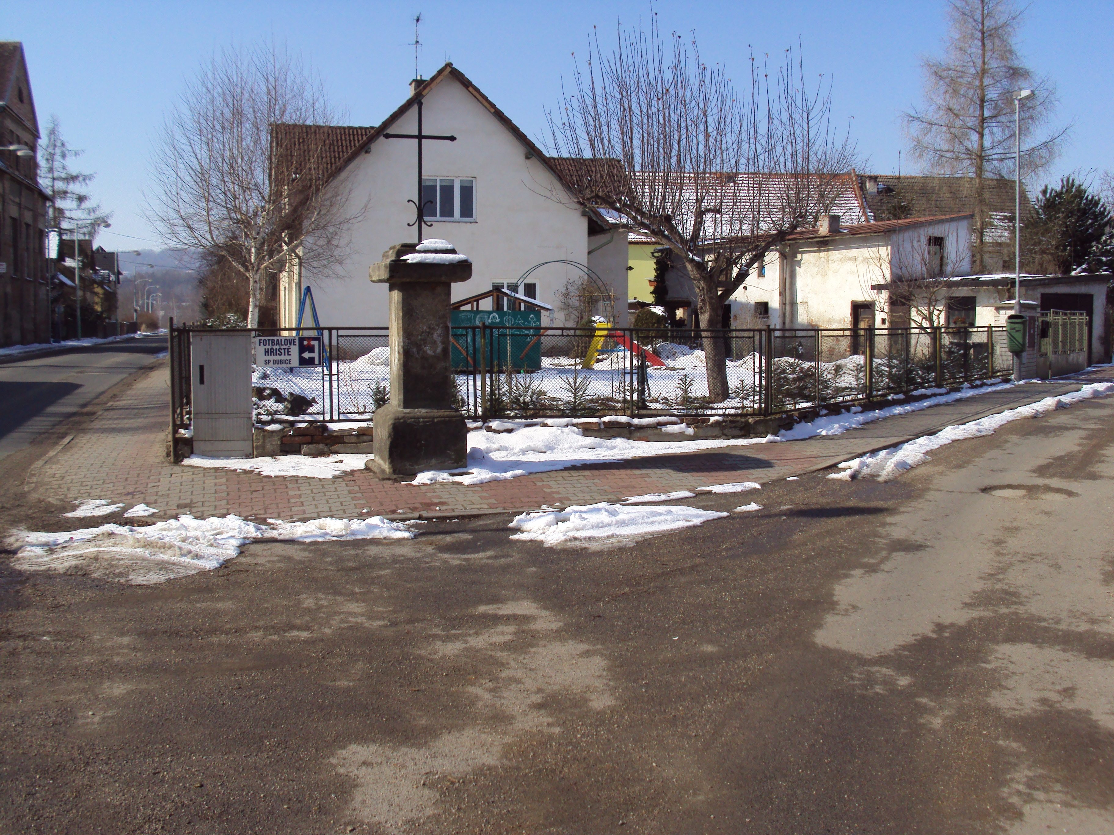 Česky: Křížek ve staré části Dubice